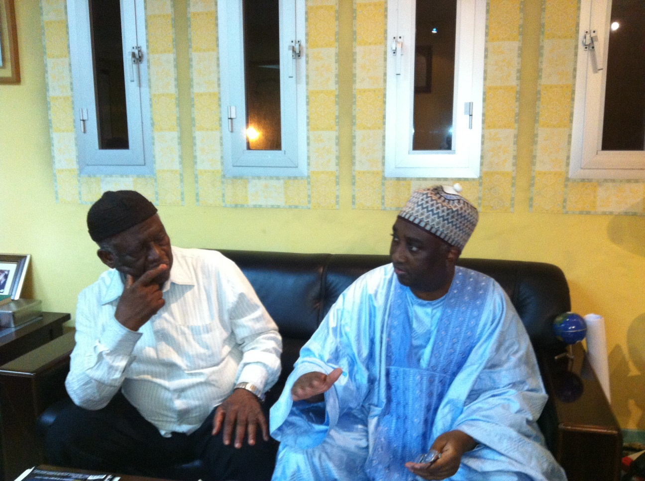 rencontre john fru ndi et bayero fadil